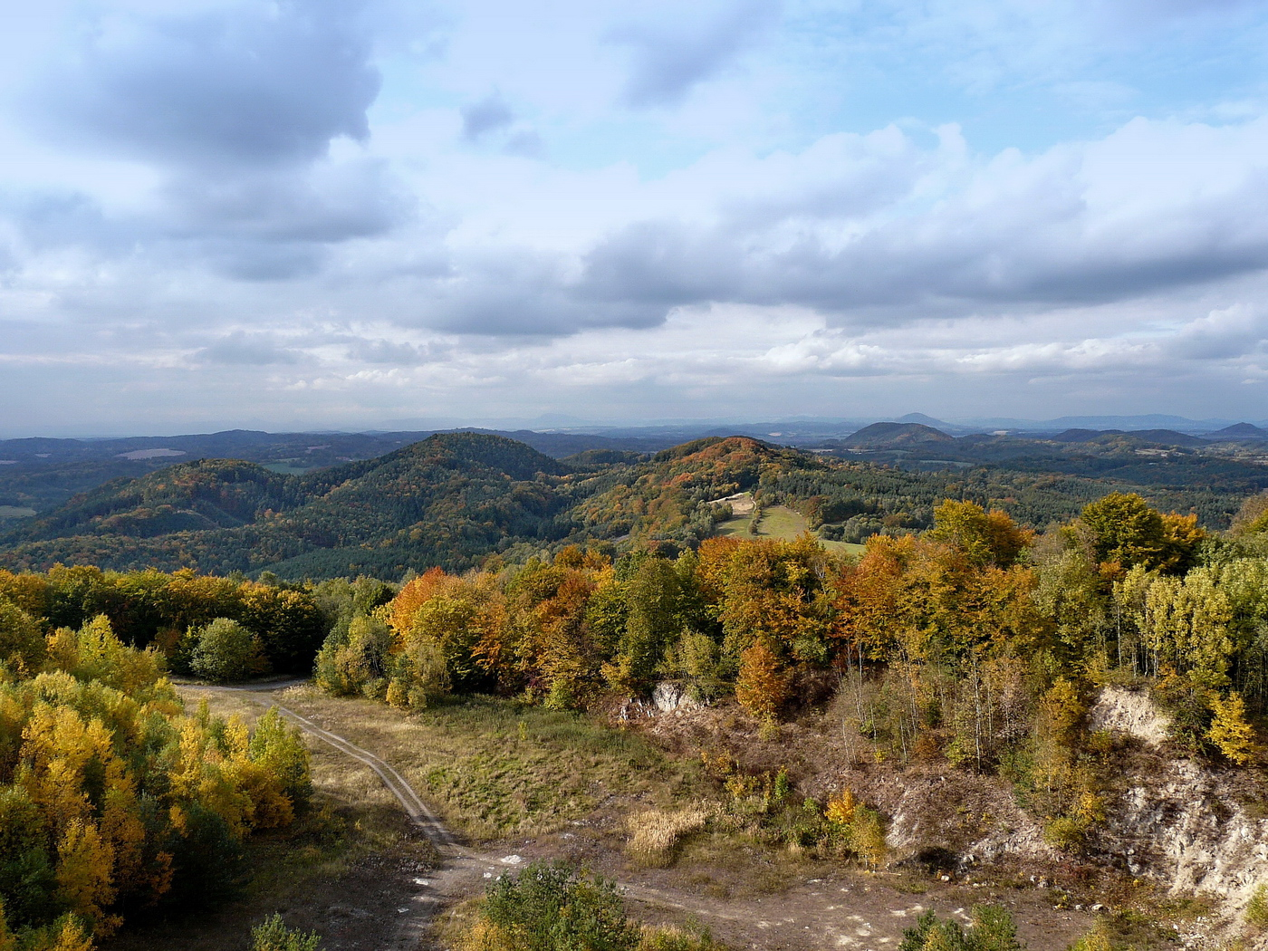 Housecké vrchy a Kokořínsko z Vrátenské hory: zleva Uhelný vrch, Drnclík, Špičák (Lipový vrch a Zámecký vrch jsou v zákrytu); v popředí trachytový lom